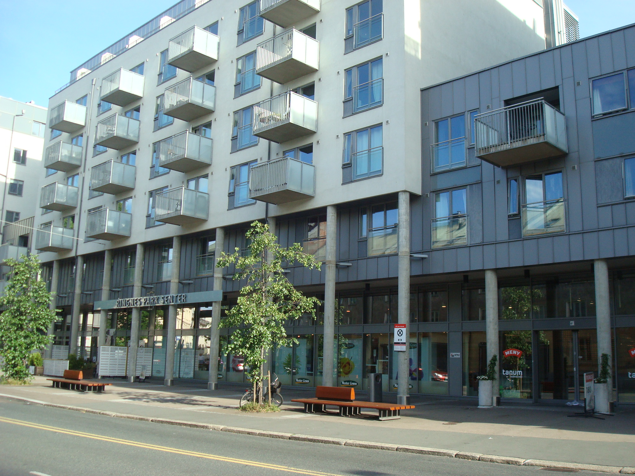 Del av Ringnes Park i Oslo, sett fra Sannergata.